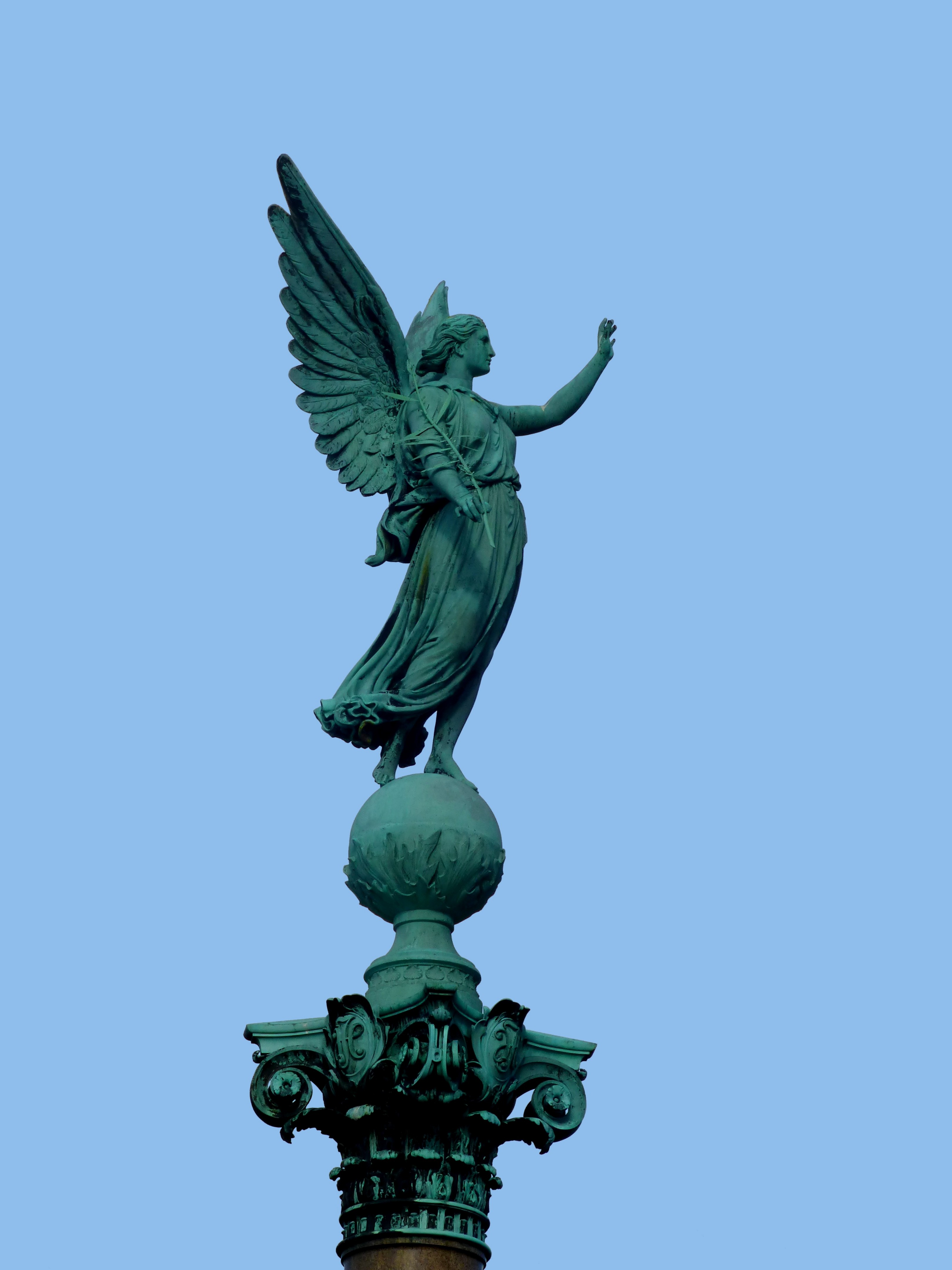 Kopenhagen - Engel am Hafen - Engle på havnen